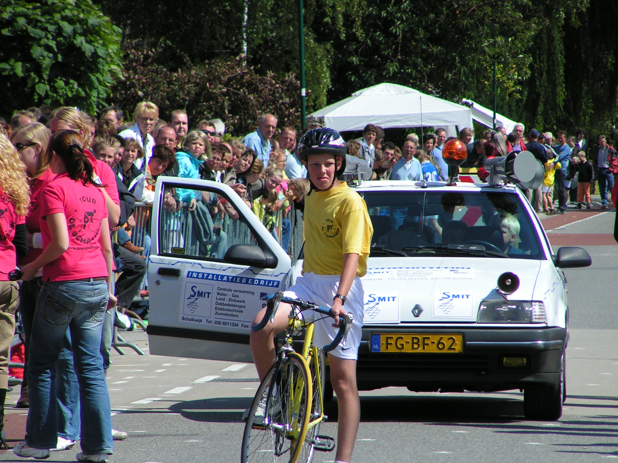 Jan Willem van Schip in de tijdrit van de Tour de Schalkwijk in 2007